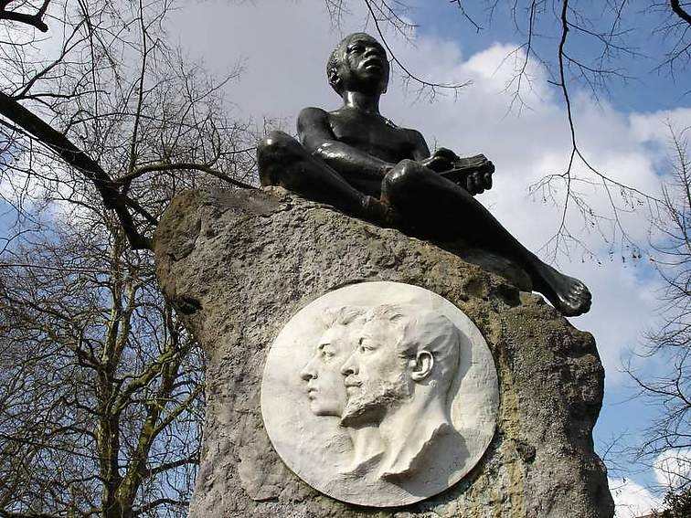 Monument voor Jozef en Lieven Van de Velde alias "'t Moorken" - Citadelpark - Gent. Ontwerp: Louis Jean Mast en Armand Heins